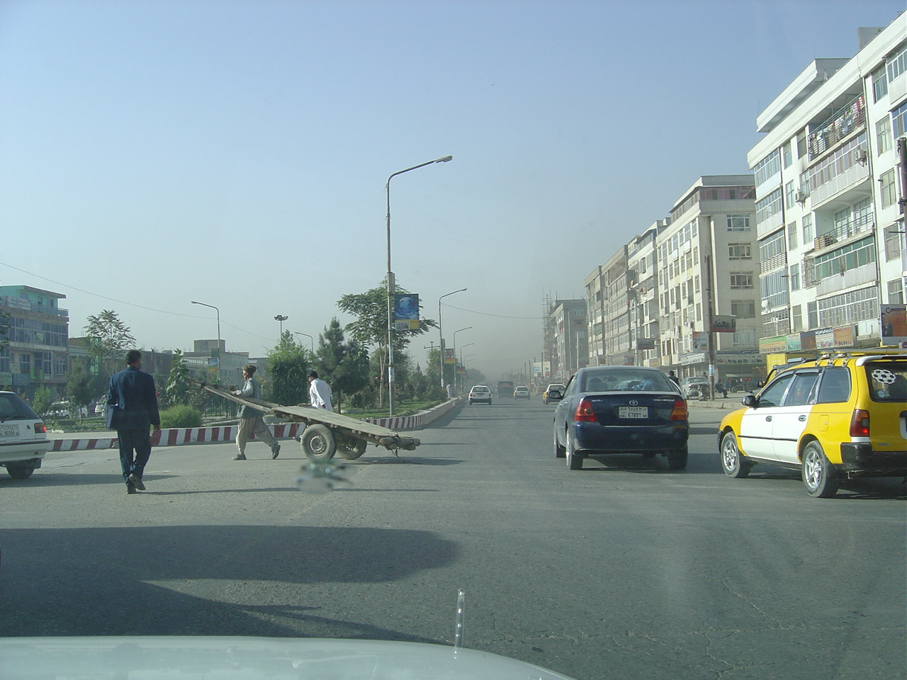 Street in Kabul